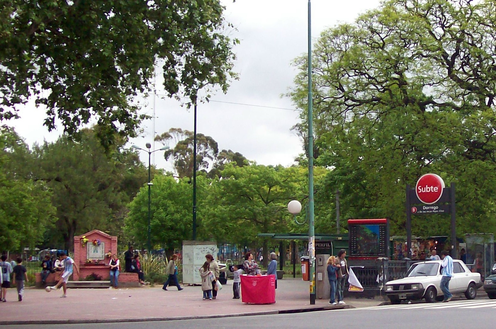 Entrada a la estación Dorrego del Subterraneo linea B (subway) y al Parque Los Andes, en Chacarita, Buenos Aires